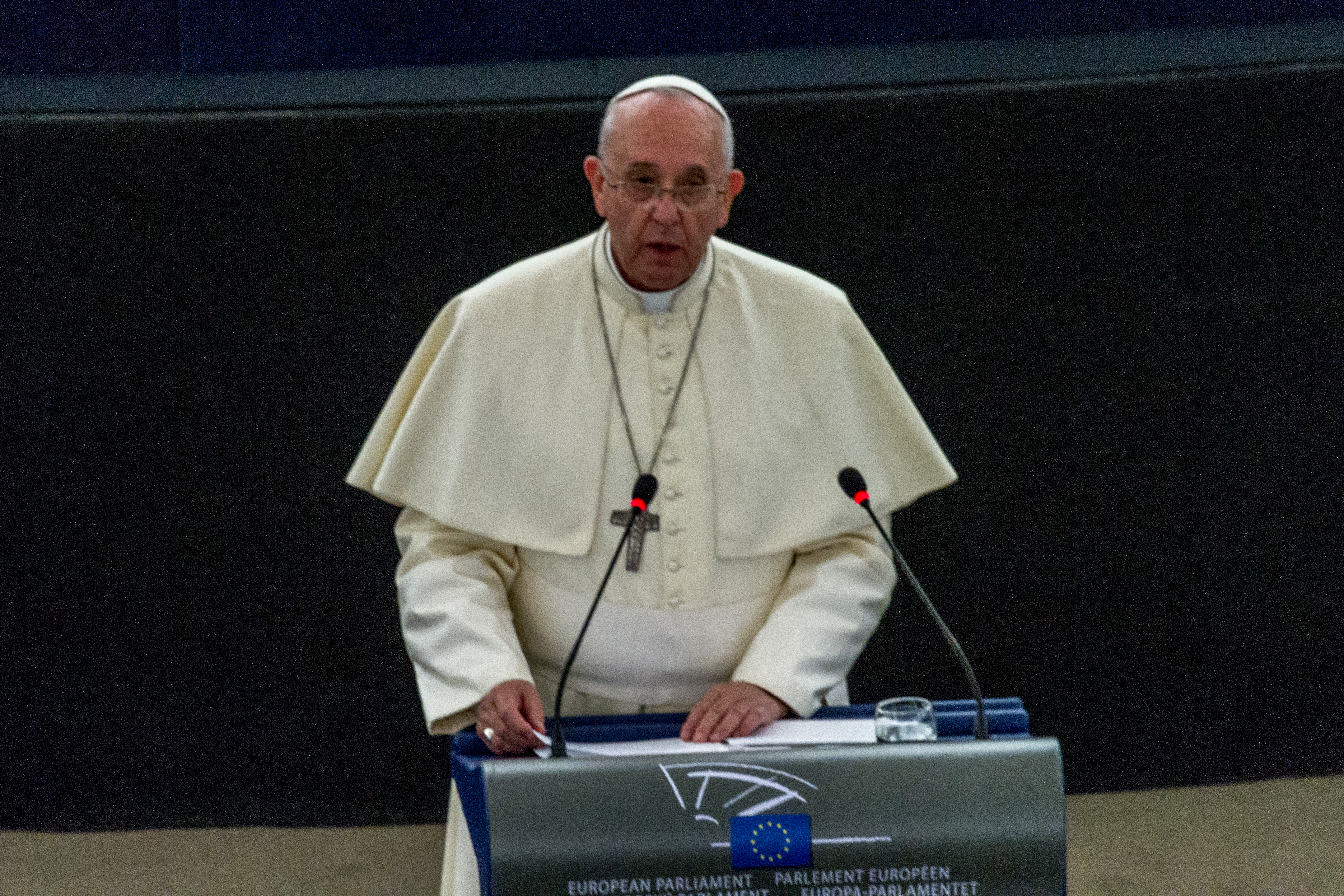 Visite du pape François au Parlement européen de Strasbourg.